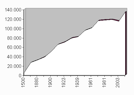 Einwohnerentwicklung in Innsbruck